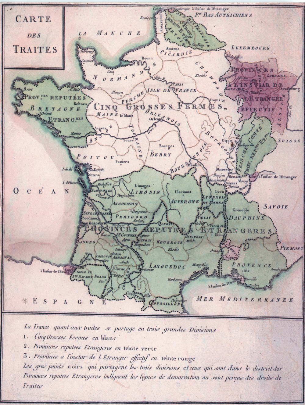 Carte établie par l'administration royale en 1732 pour représenter les traites, c'est à dire les zones disposant de statuts fiscaux en terme de barrières douanières. Les cinq grosses fermes : en gros la partie nord de la Loire à quelques exceptions près où le commerce interne était libre et les droits de douane vers les autres provinces et l'étranger avaient été uniformisés (Anjou, Aunis, Berry, Bourbonnais, Bourgogne, Champagne, Maine, Orléanais, Picardie, Poitou, Touraine). Les provinces réputées étrangères : Le Royaume de Navarre et la Soule à l'extrême Sud Ouest, La Bretagne (à l'Ouest), La Flandre, l'Artois (dans le Nord), la Franche Comté (à l'Est) l'Occitanie et le Roussillon (dans le sud de la France) payaient des droits de douane lorsqu'elles échangeaient entre elles ou avec les autres provinces ordinaires du royaume de France. Les provinces à l'instar de l'étranger effectif : comme Bayonne et le Labourd, l’Alsace, la Lorraine, le Comtat Venaissin (États du Pape) étaient considérées comme étrangères au royaume (Provinces à l'instar de l'étranger effectif). À ce titre, elles pouvaient commercer librement avec l'étranger, mais payaient des droits de douane importants pour les échanges commerciaux avec les autres provinces françaises. En 1732, la Savoie, le comté de Nice, la Corse ne font pas partie du Royaume de France.